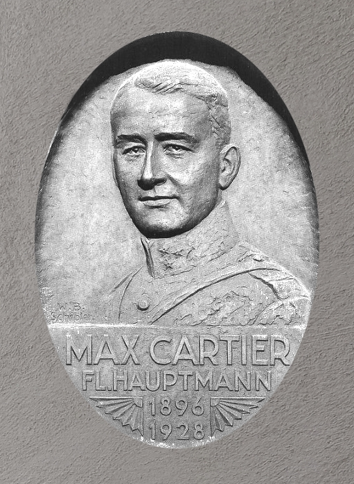 Max Cartier (1896–1928) Denkmal auf dem Flugplatz Gheid in Olten